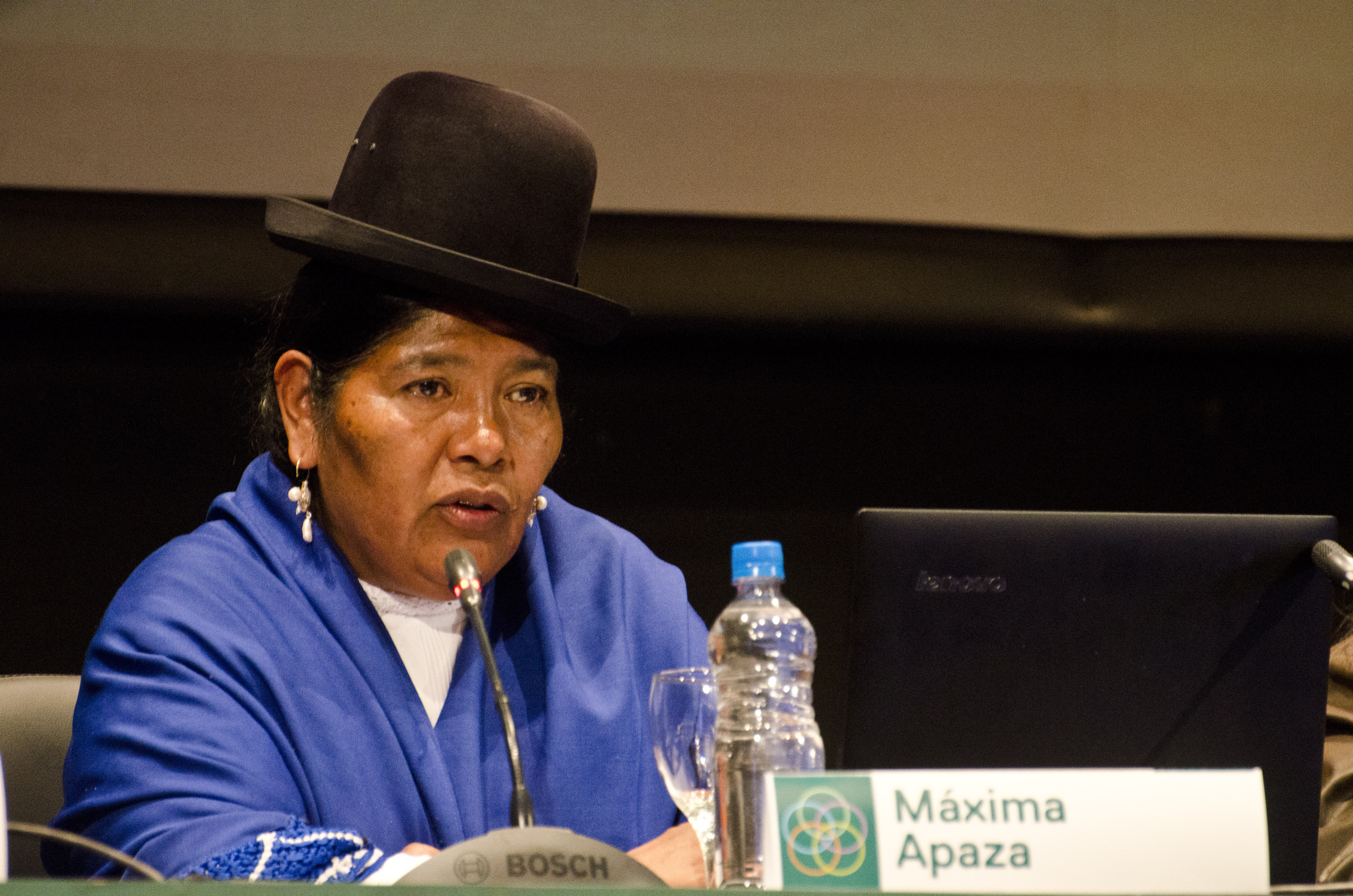 San Miguel de Tucumán, 6 de julio de 2015: En el marco del Foro por una Nueva Independencia, Nacional y Latinoamericano, que se llevó a cabo en el Teatro San Martín (Tucumán) se realizó la mesa «Con mujeres tendrá que pelear» con las disertantes Hebe de Bonafini (Argentina), Milagro Sala (Argentina), Máxima Apaza (Bolivia), y Piedad Córdoba (Colombia). Moderó Marta Dillon.